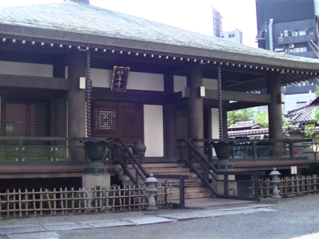 妙善寺 (東京都港区) の本堂